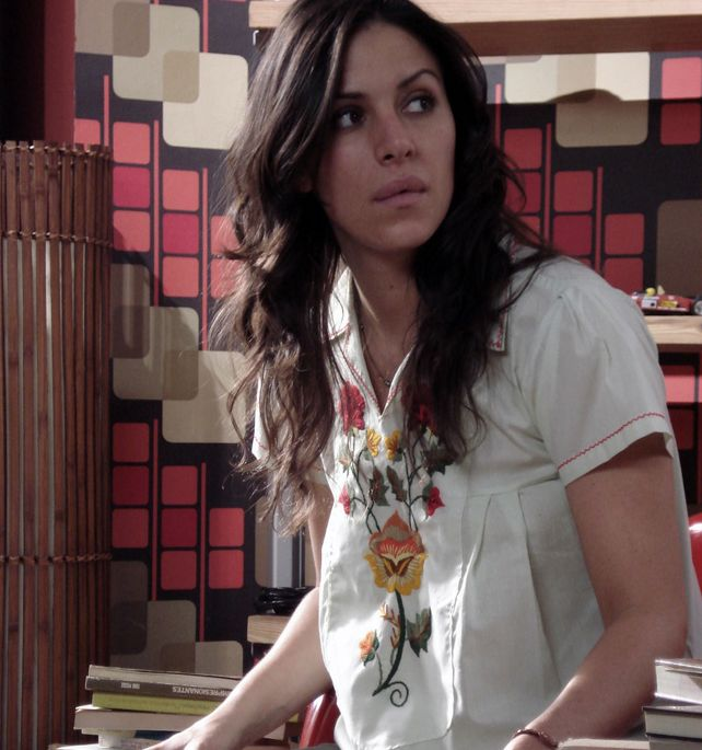 Alexandra de la Mora tuvo que adoptar un acento castellano para interpretar su personaje.